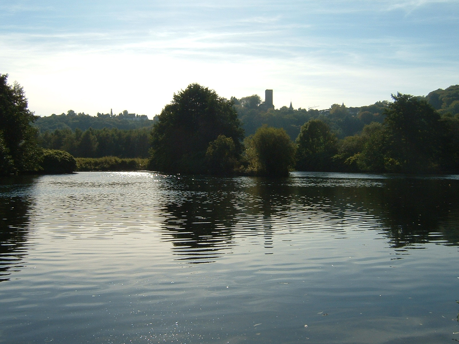 Blick vom Bochum-Stiepeler Ruhrufer übers NSG Alte Ruhr-Katzenstein auf Burg Blankenstein